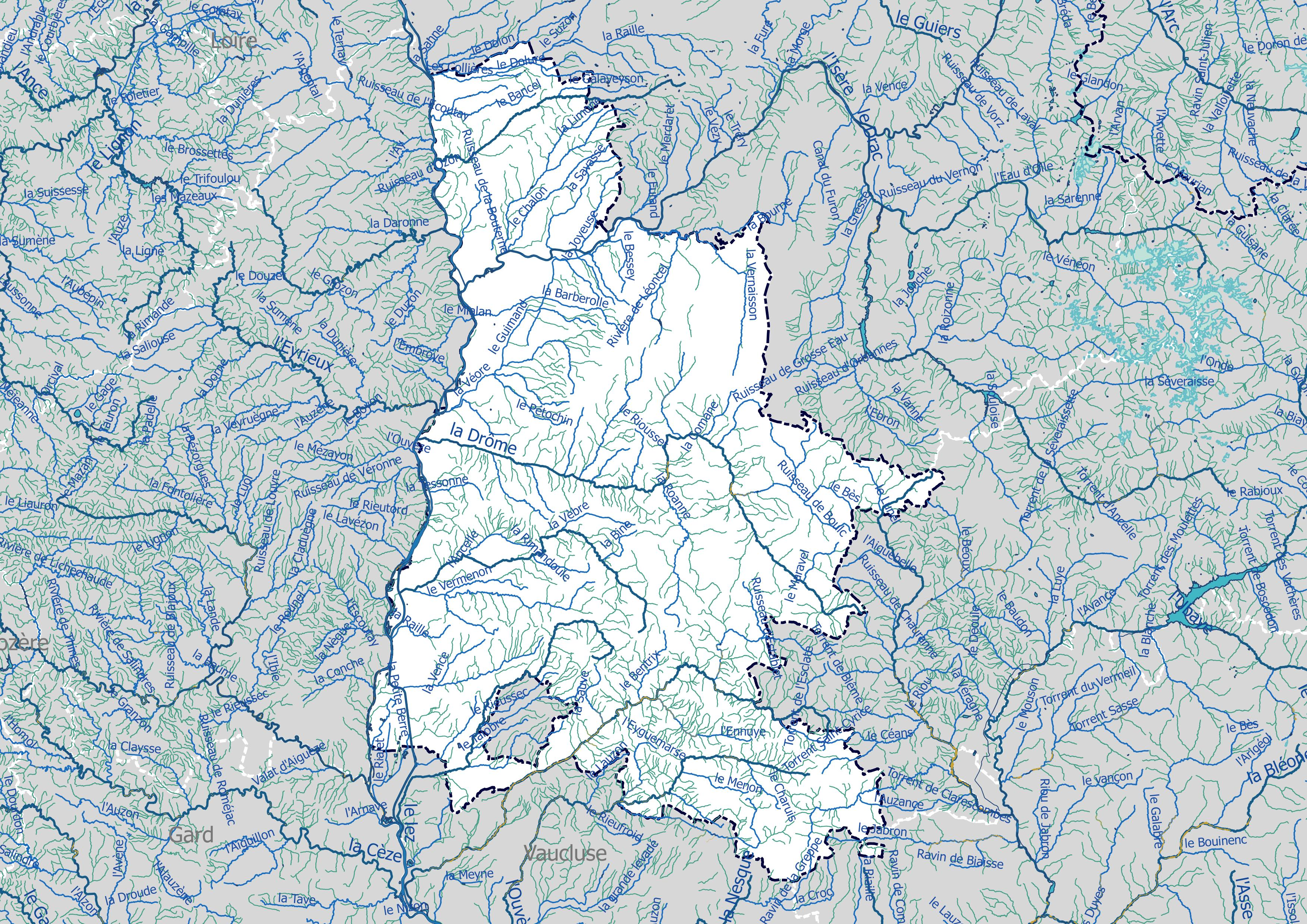 Réseau hydrographique du département de la Drôme (France).